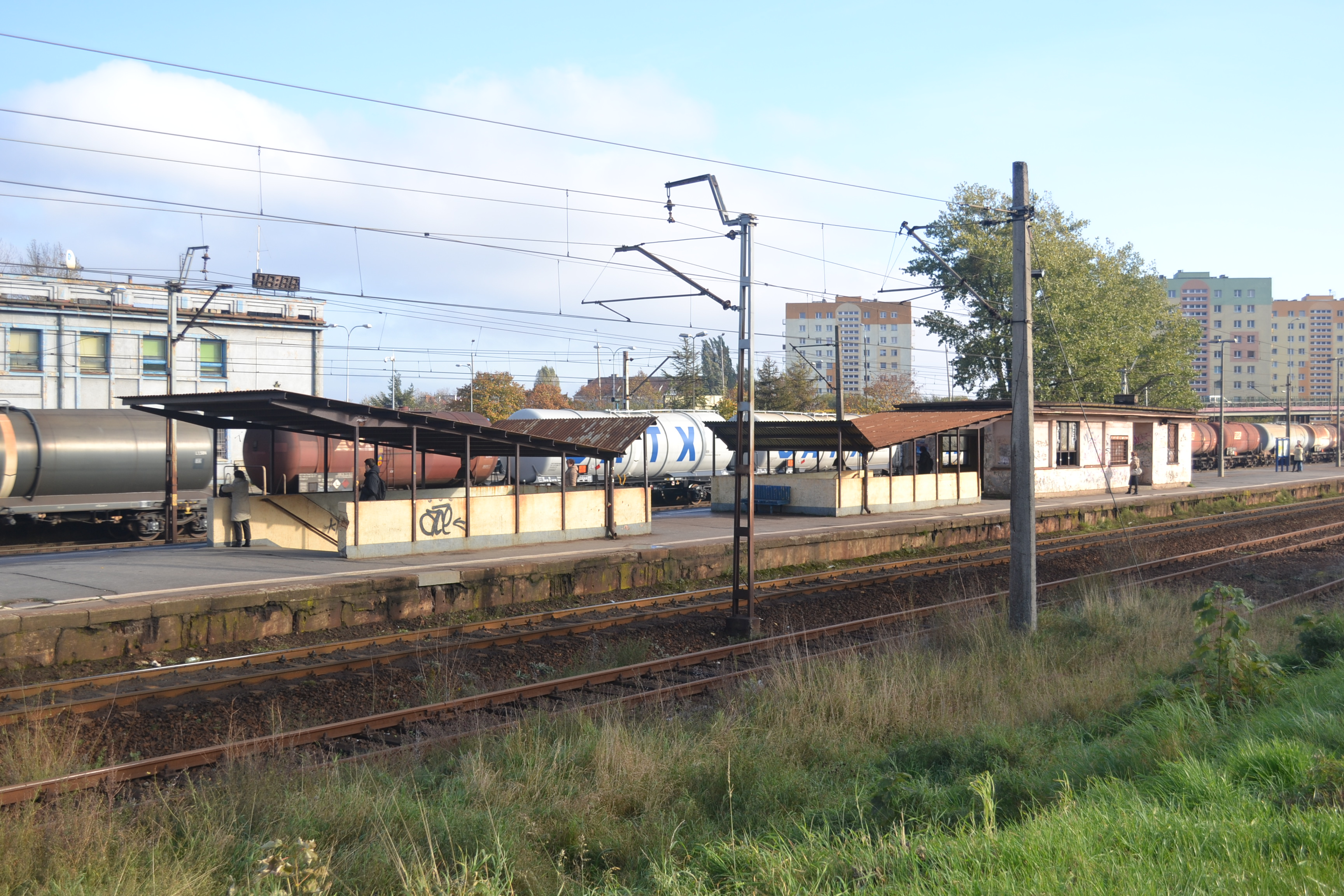 stacja Rumia